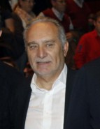 16 de noviembre. Ignacio González, Ignacio Astarloa y Esteban Parro participan en un mitin en Móstoles